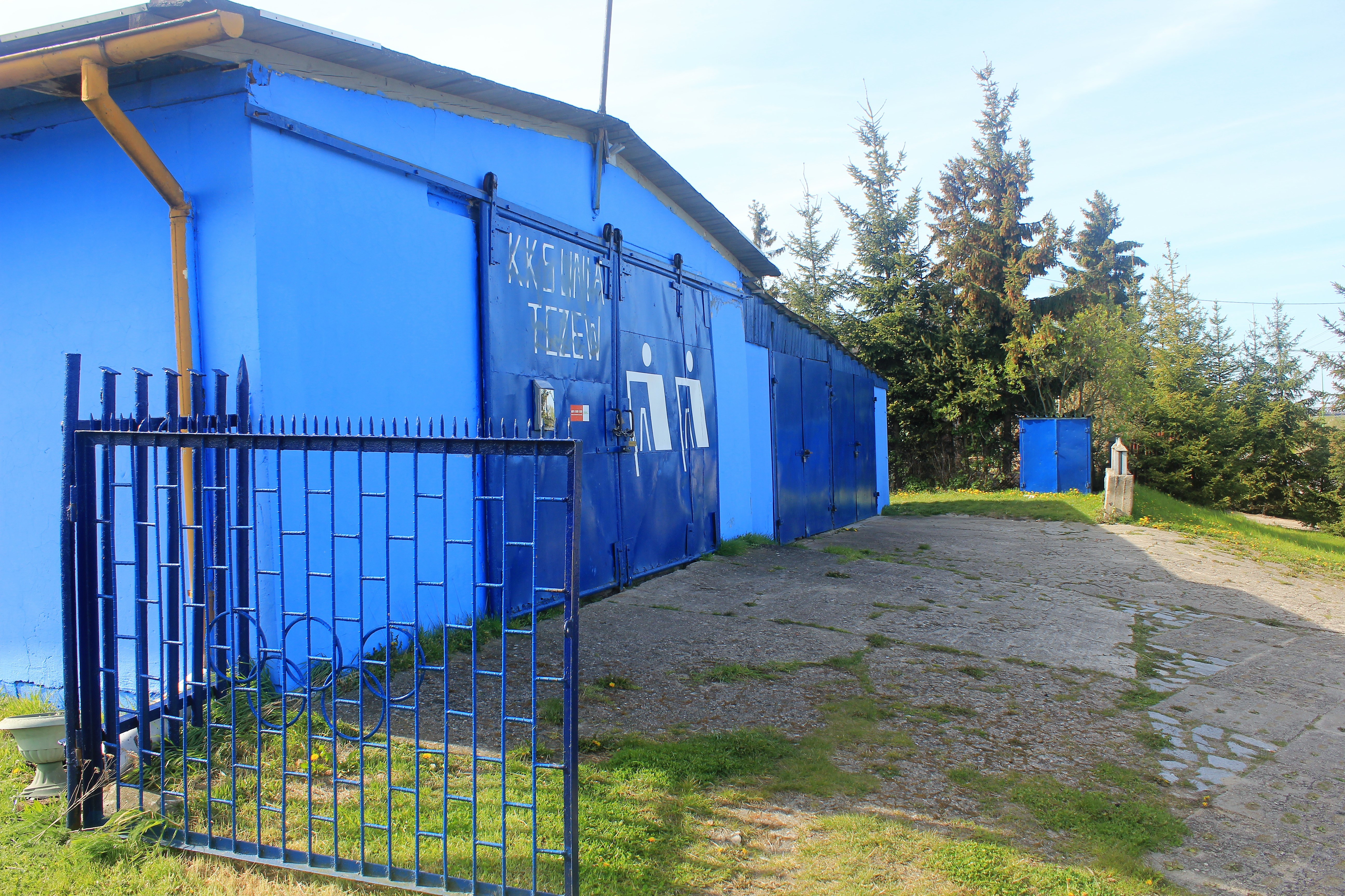 Przystań Unii Tczew - hangary nad Wisłą